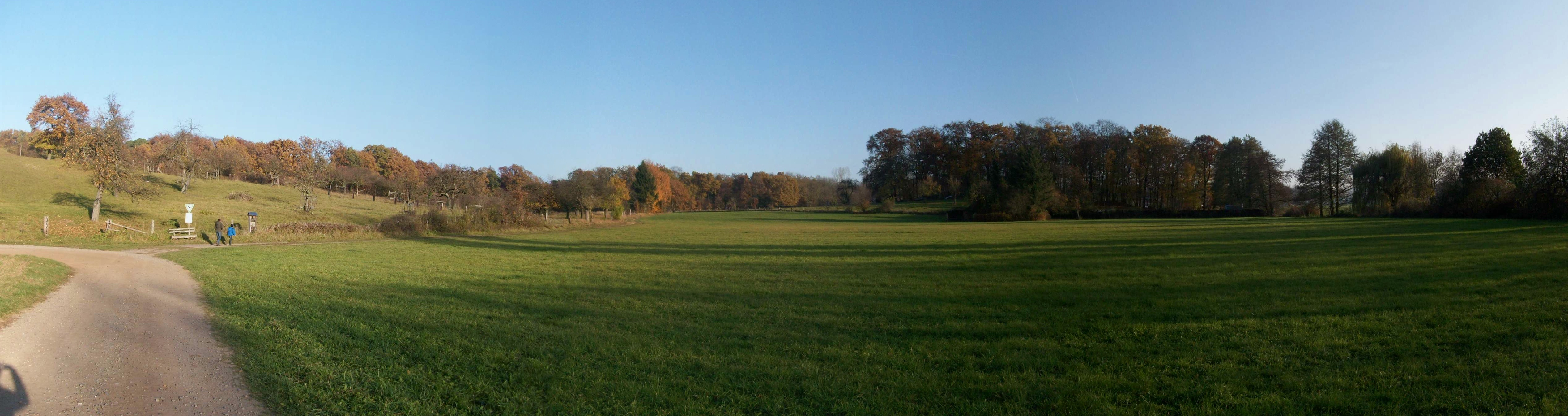 Panorama hinter der Straßenmühle zwischen Langstadt und Schlierbach mit zwei möglichen Standorten der Burg Schlierbach: im Bild links das Landschaftsgebiet "Wingertsberg von Langstadt" auf der Kuppe nördlich der Straßenmühle, im Bild rechts der Mitte die Baumgruppe, die von verlandetem Wassergraben umgeben ist und östlich der Straßenmühle liegt.